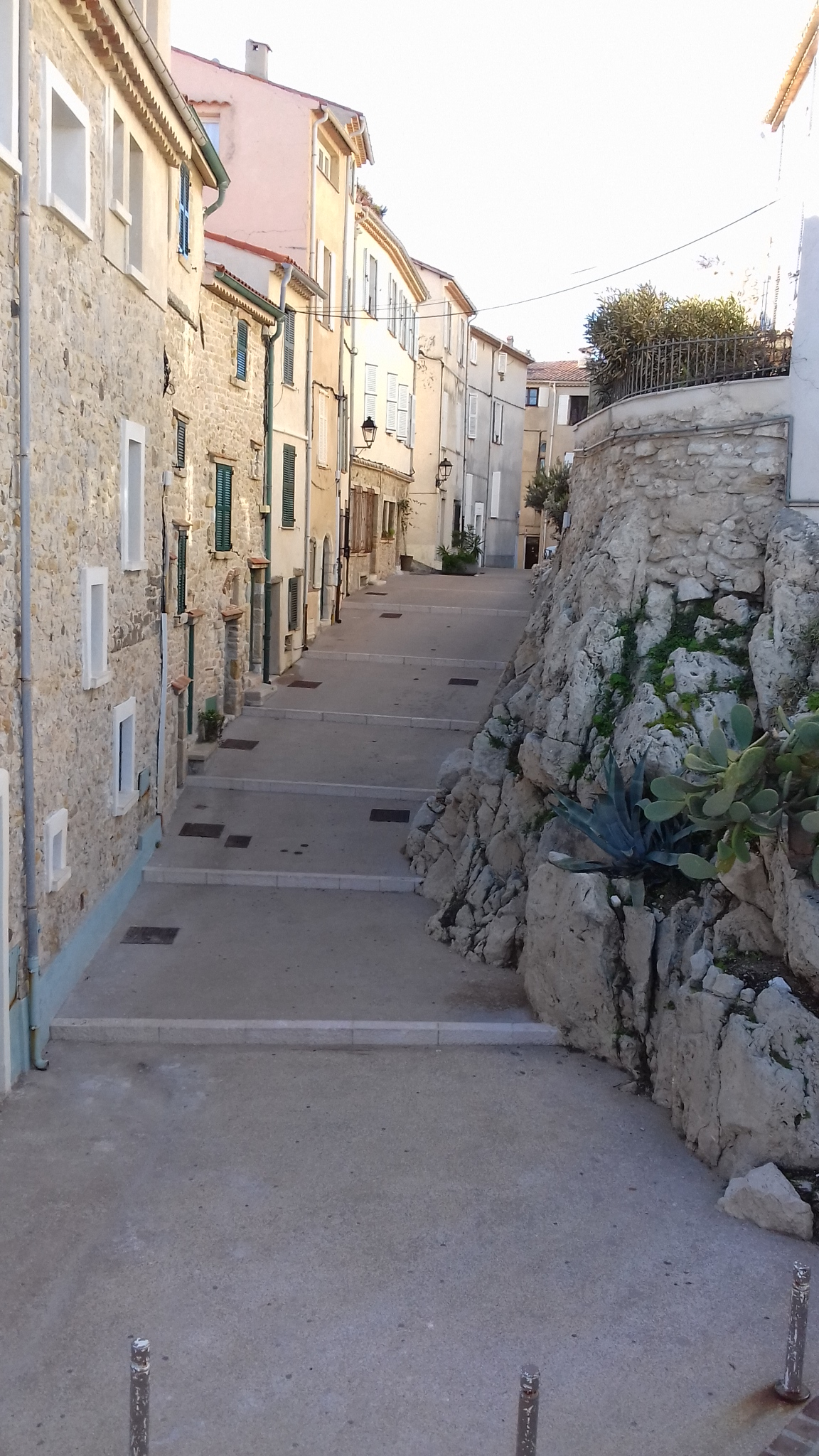 rues d'Antibes